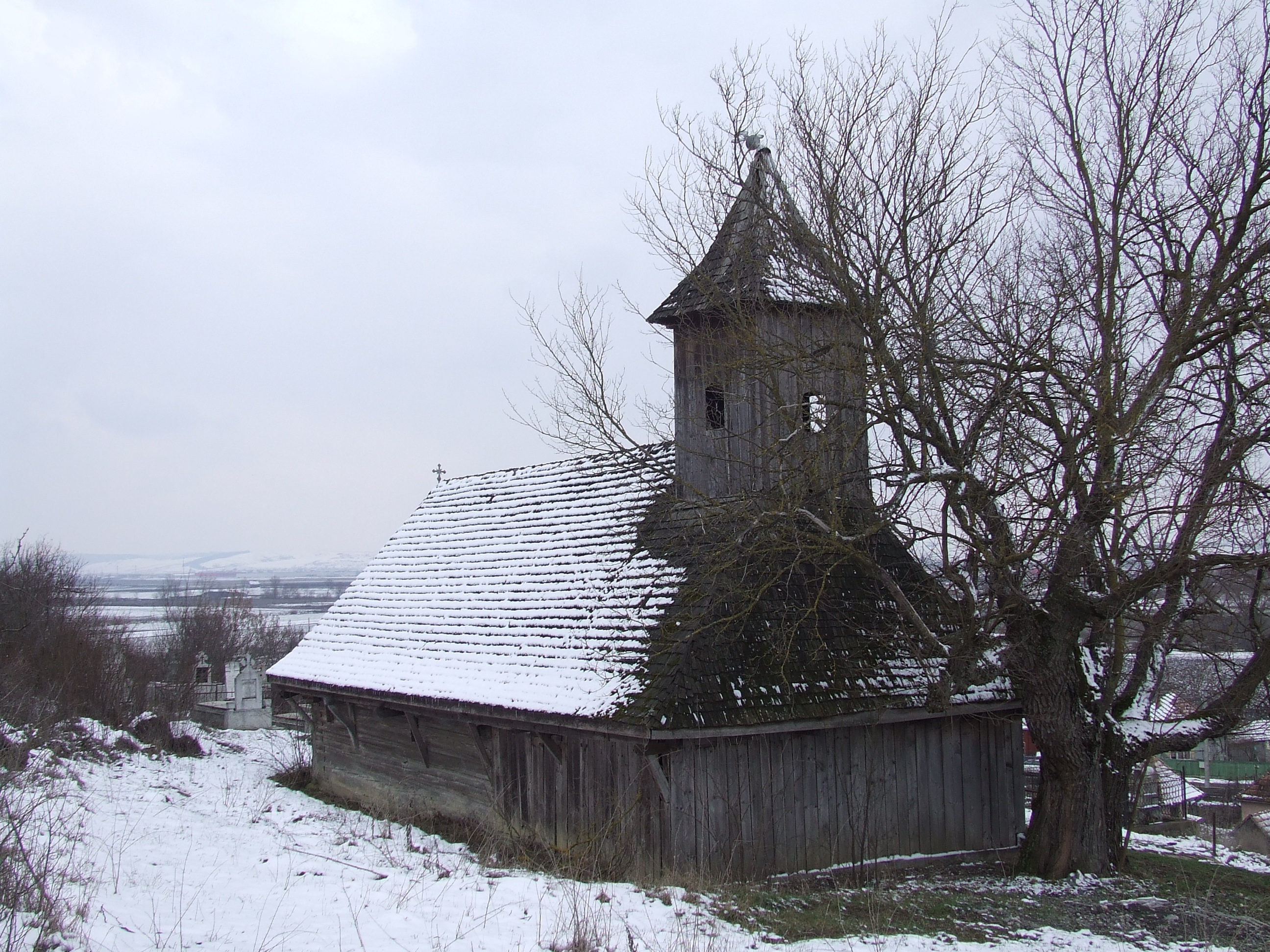 Biserica de lemn din Sânmărghita, judeţul Mureş.